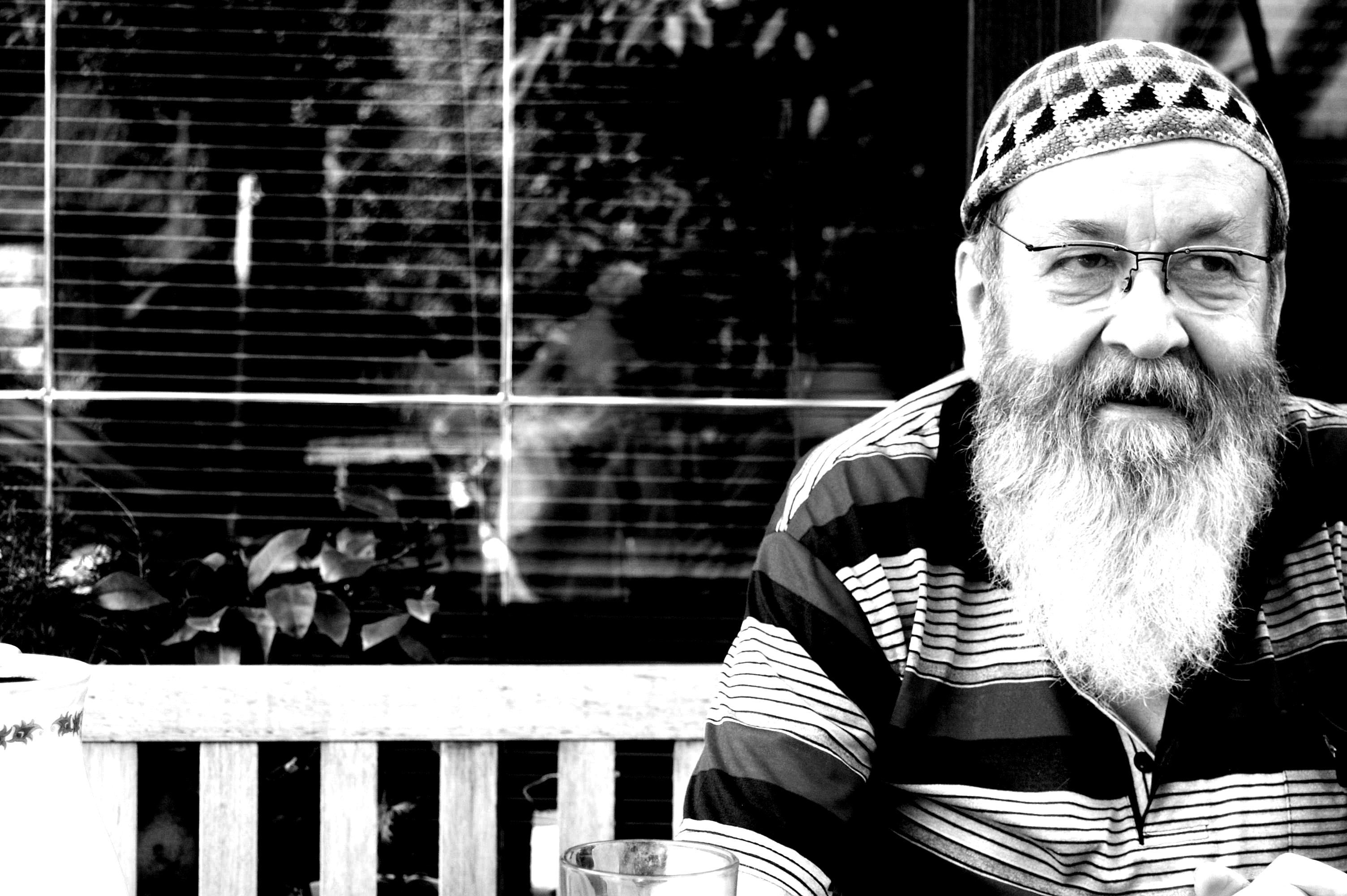 Detlef Kobjela im Jahre 2010